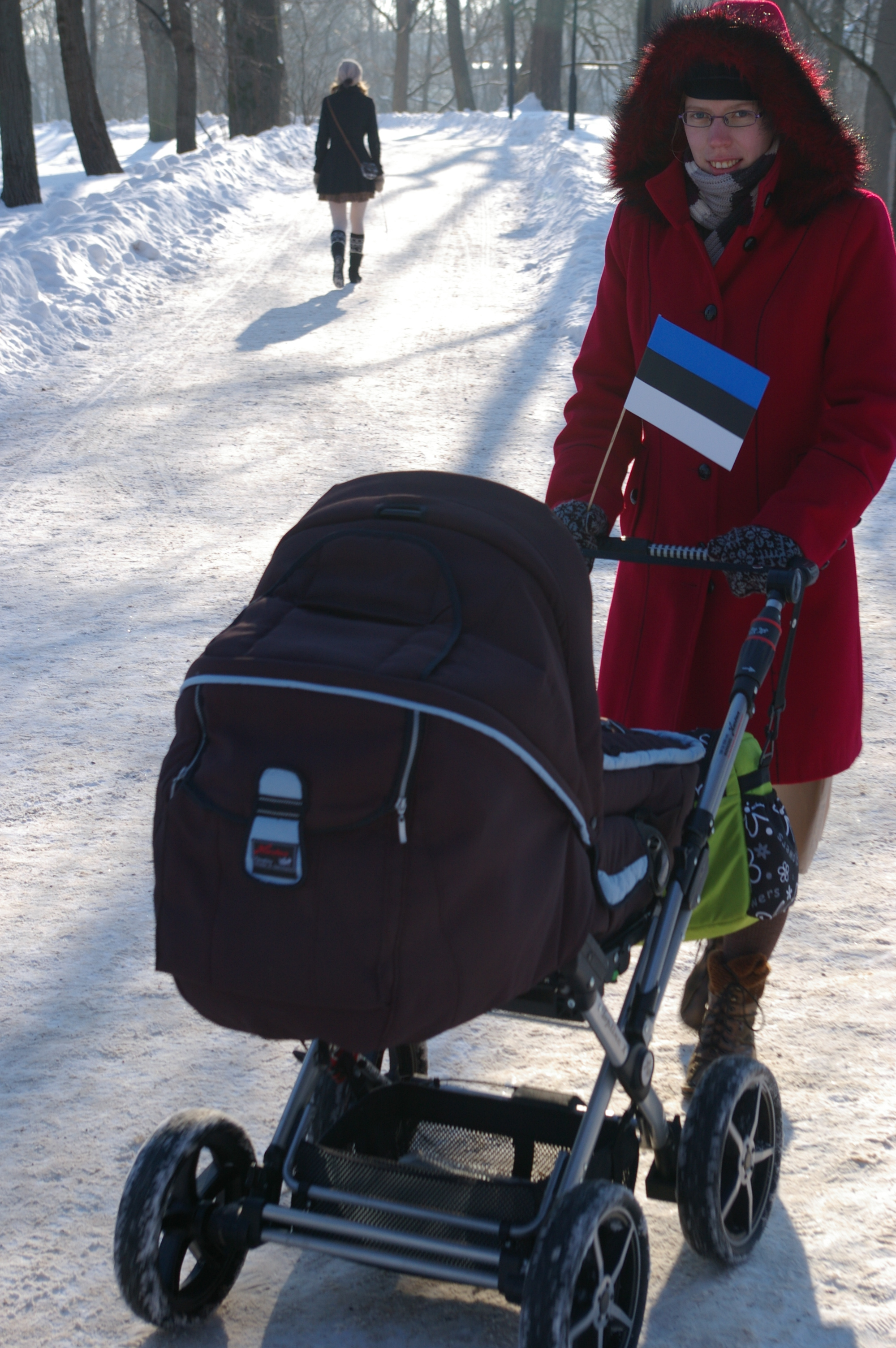 Vabariigi aastapäeval Tartu Tähetorni juures